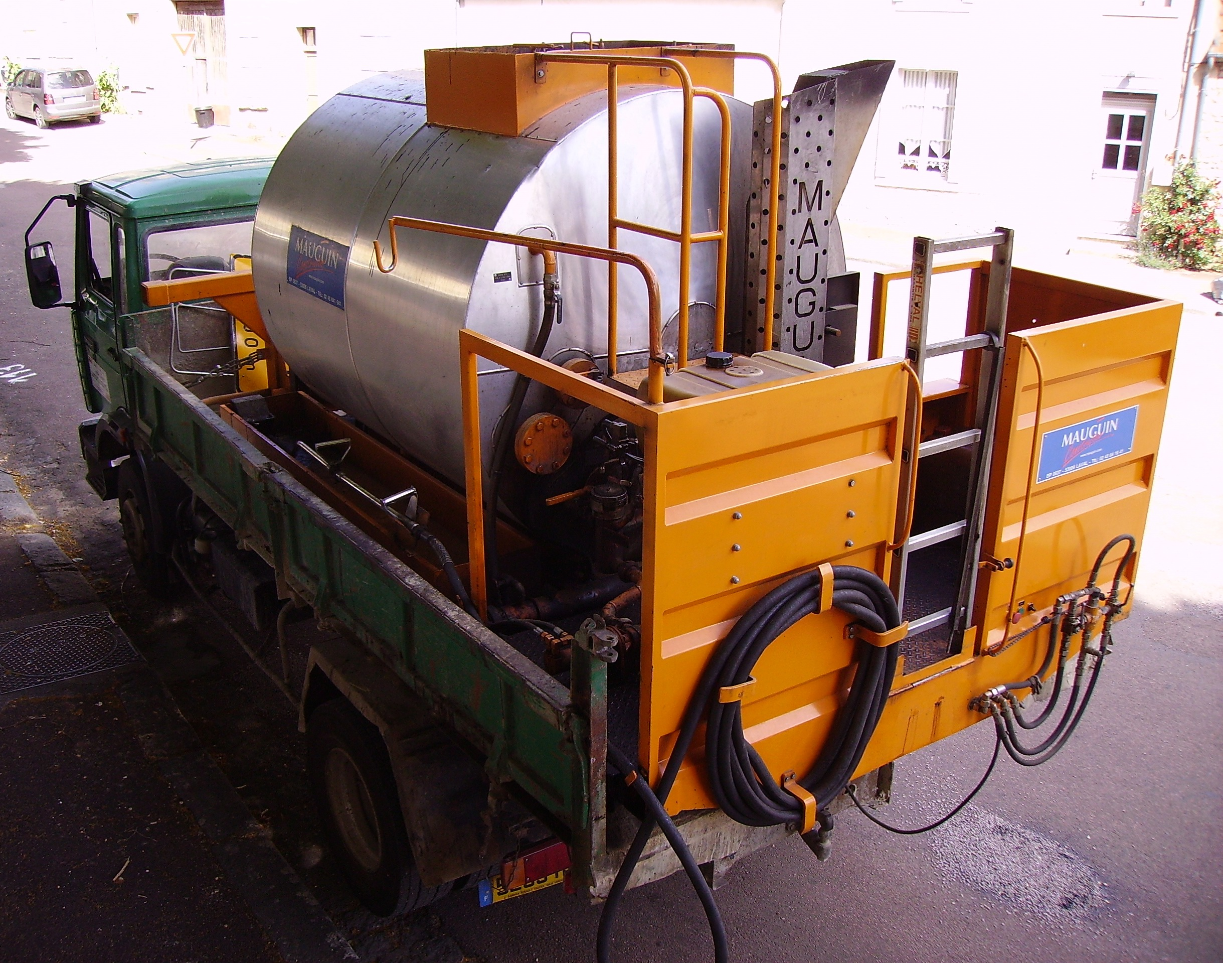 Citerne à bitume calorifugée sur camion Renault Midliner.